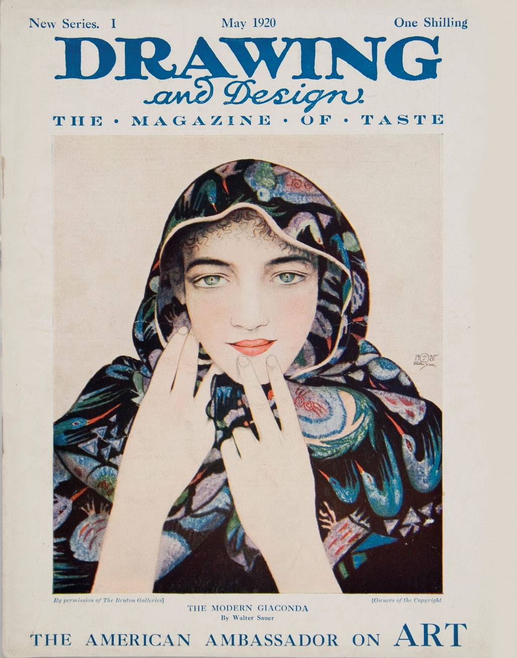 La Joconde Moderne (1920) - couverture de Drawing and Design